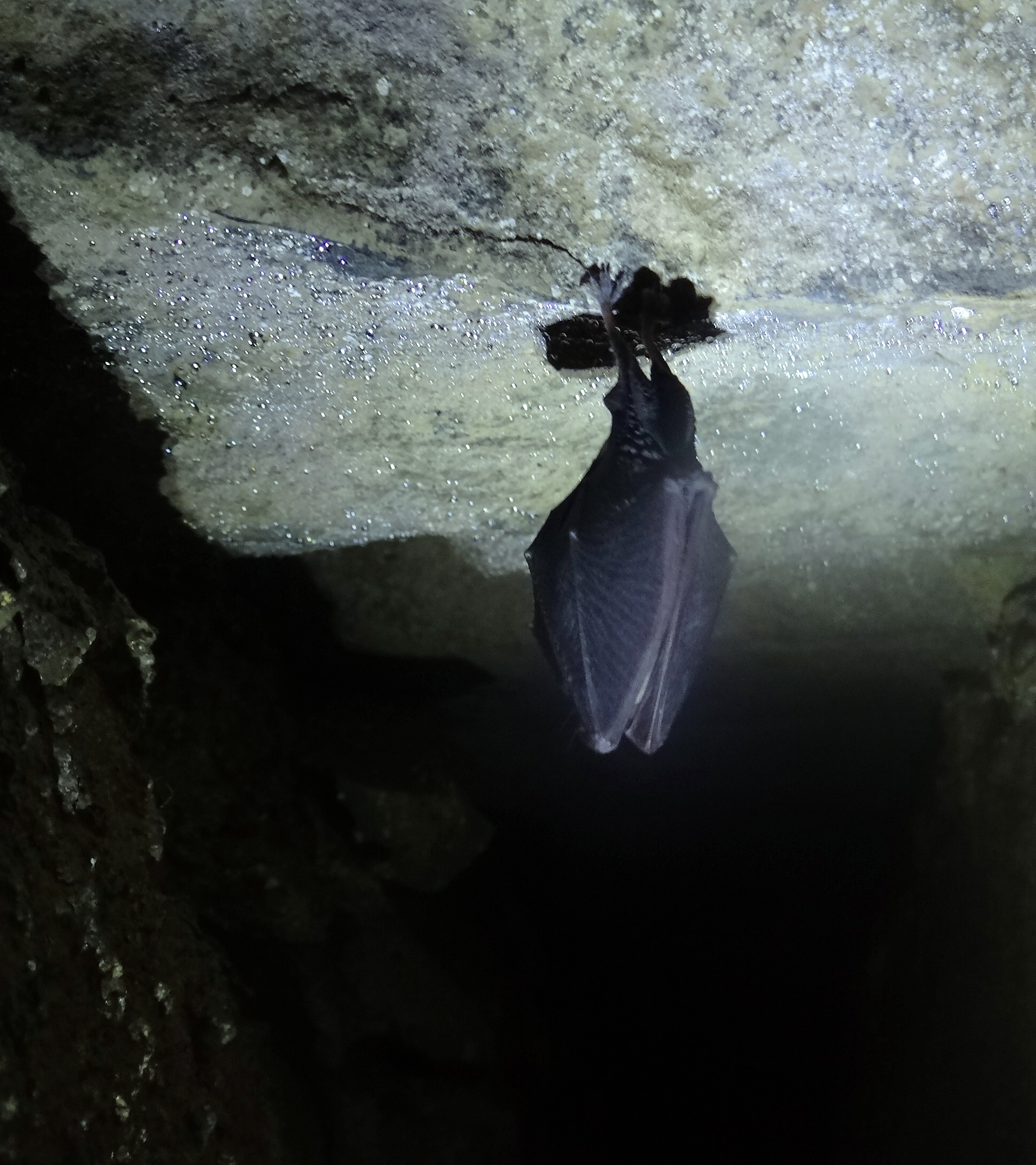 Złotopieńska Dziura. Nietoperz podkowiec małyRhinolophus hipposideros in cave.